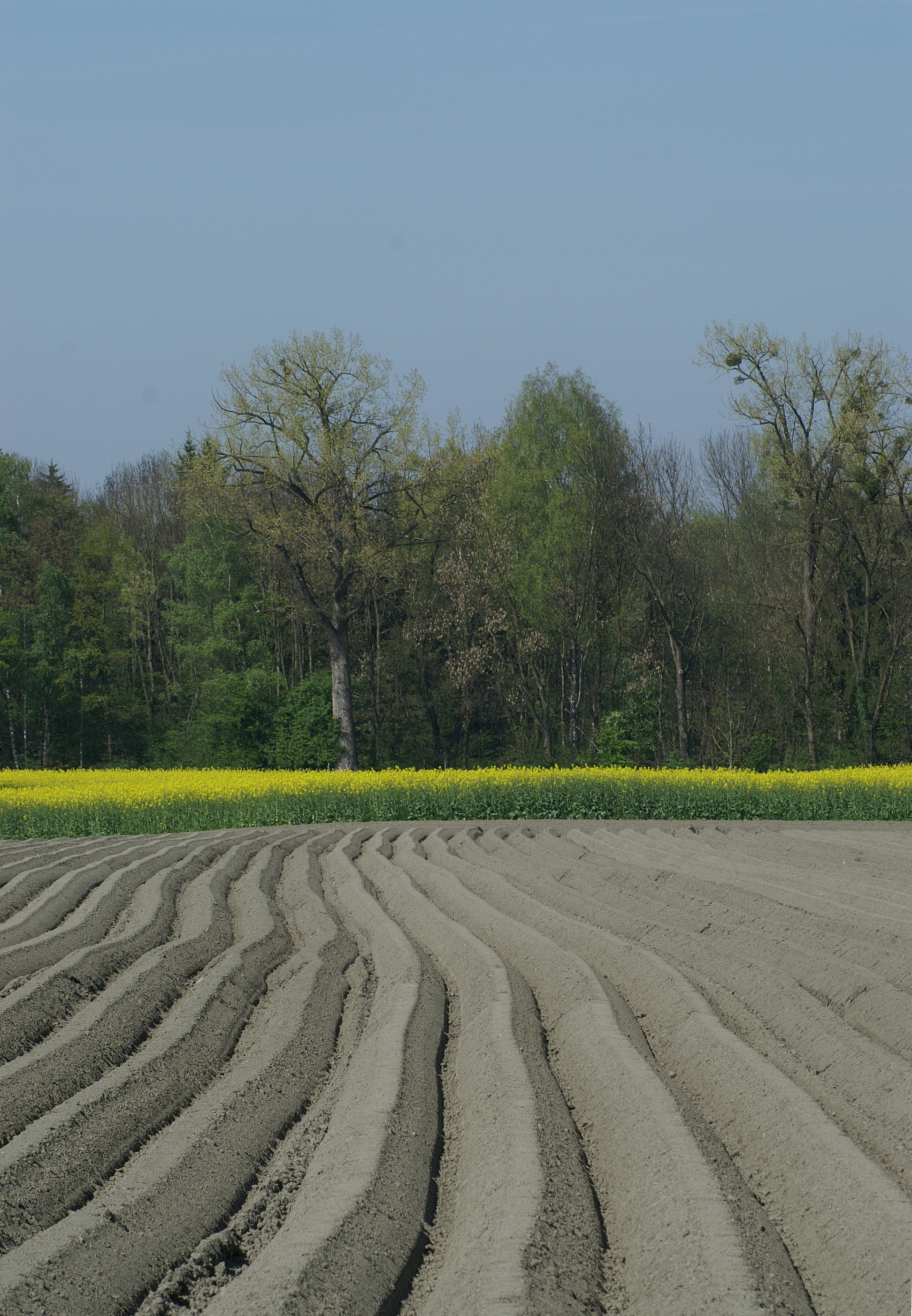 Kartoffelacker und Rapsfeld